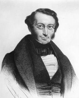 Léandre Desmaisières, ministre belge